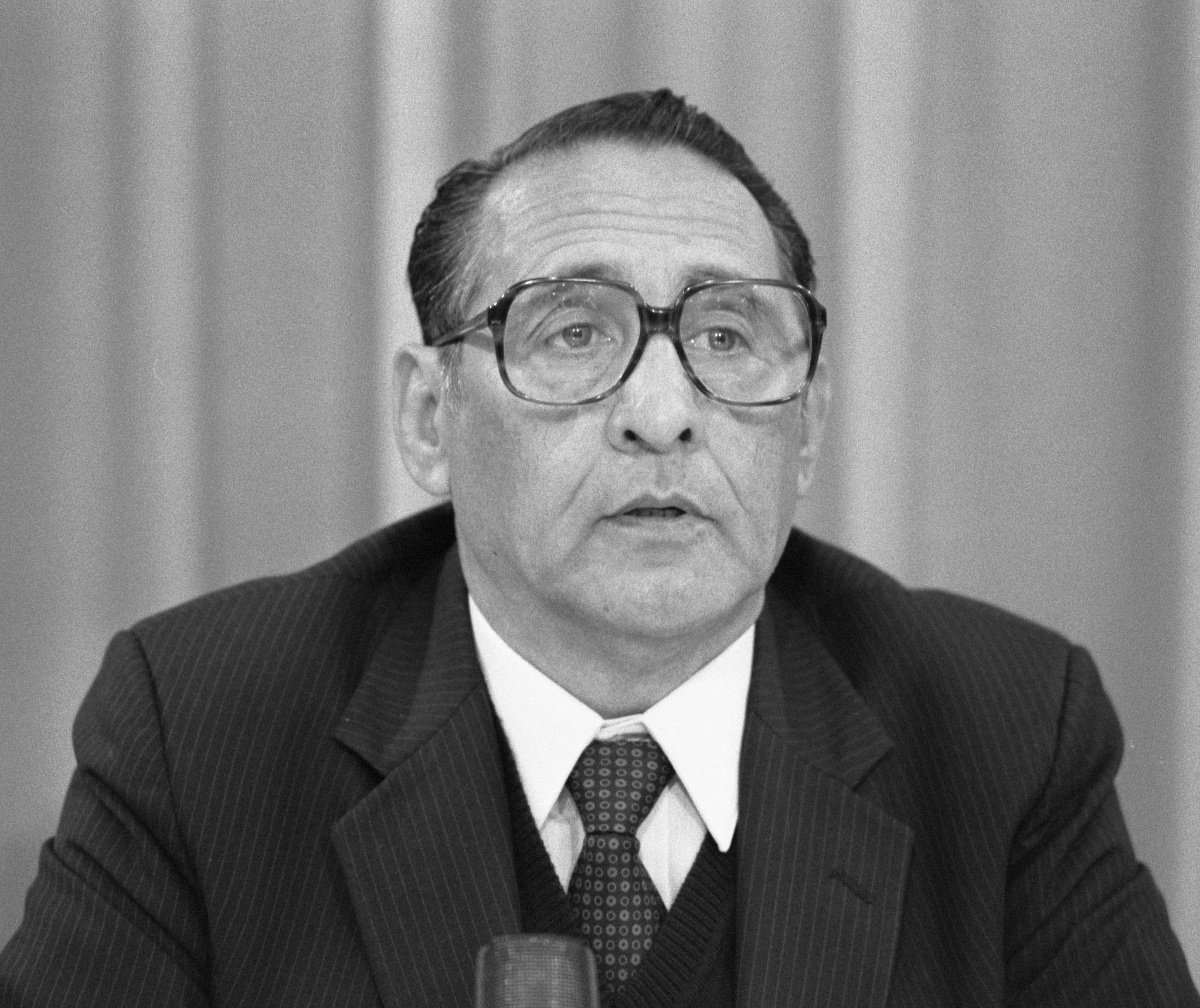 Persconferentie president Duarte , kop